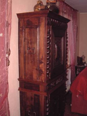 Je suis l'auteur de la photo et de réalisateur du meuble.